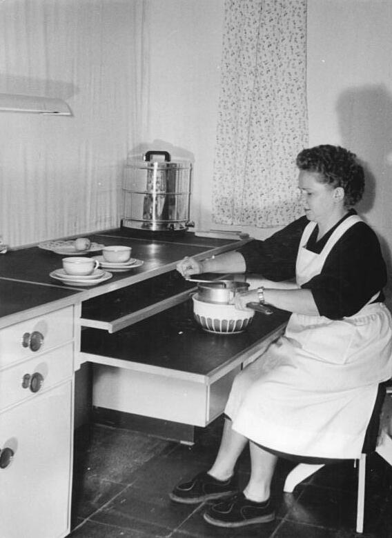 Zentralbild-Hesse-Mihatsch We-Qu 19.9.1956 Ausstellung "Die Welt der Frau". Die hohe Zahl der Besucher, die bisher die Ausstellung "Die Welt der Frau" in der Deutschen Sporthalle in Berlin gesehen haben, - bisher wurden weit über 10 000 Personen gezählt - beweist, dass es sehr interessante Dinge in dieser Schau zu sehen gibt. Neben vielen Neuheiten, die der Hausfrau das Leben erleichtern, und den Werktätigen den Feierabend schöner und bequemer gestalten helfen, werden auch die Zimmereinrichtungen gezeigt, die jeder Teilnehmer an der großen Tombola zum 7. Jahrestag der DDR gewinnen kann. UBz. Raumsparend und zweckentsprechend ist die Kücheneinrichtung, die zum Hauptgewinn der großen Tombola gehört. Ein Küchentisch mit drei Platten in verschiedenen Höhen erleichtert der Hausfrau die Küchenarbeit. (siehe auch Bild 1 und 3)"